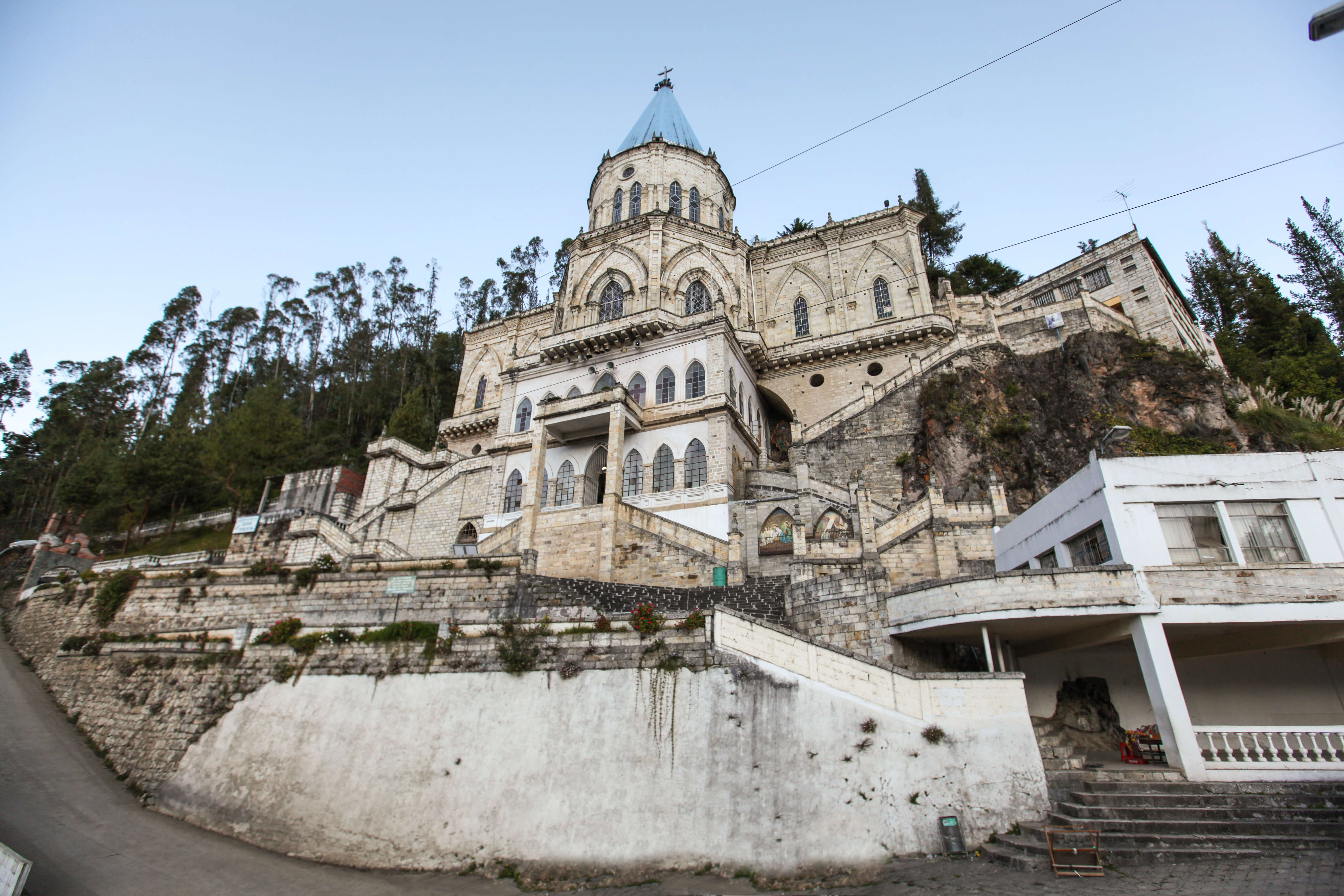 2 PRESS TRIP 048